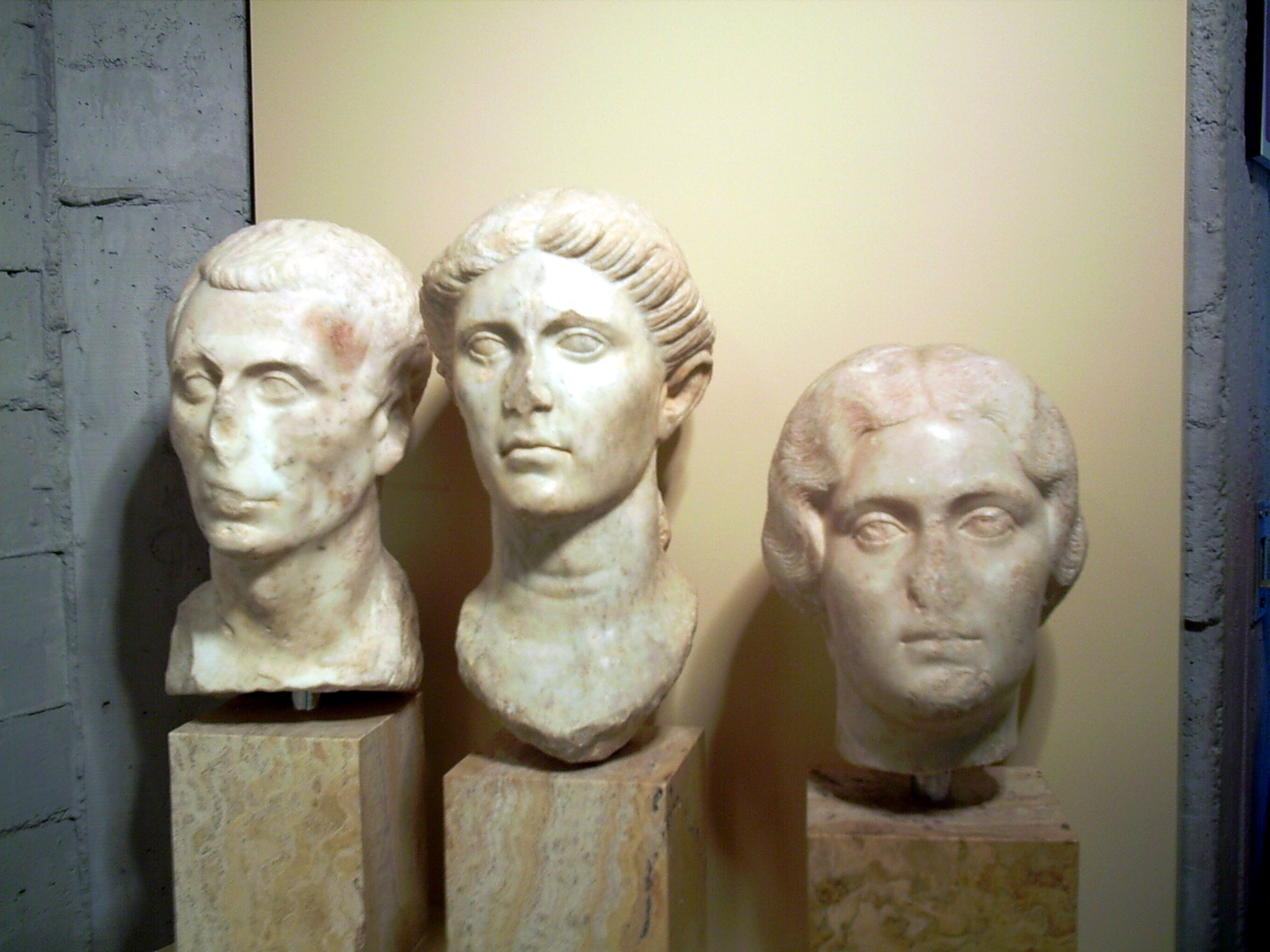 Testes de personatge romà, marbre esculpit, (segle I-II), trobat a la Vil·la romana de Can Llauder, a Mataró, el Maresme, (Catalunya). Es conserva al Museu Comarcal de Mataró, número de catàleg MCMM 1389, MCMM 1399 i MCMM 1400.